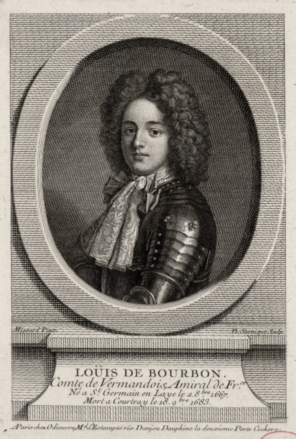 Louis de Bourbon (1667-1683), comte de Vermandois